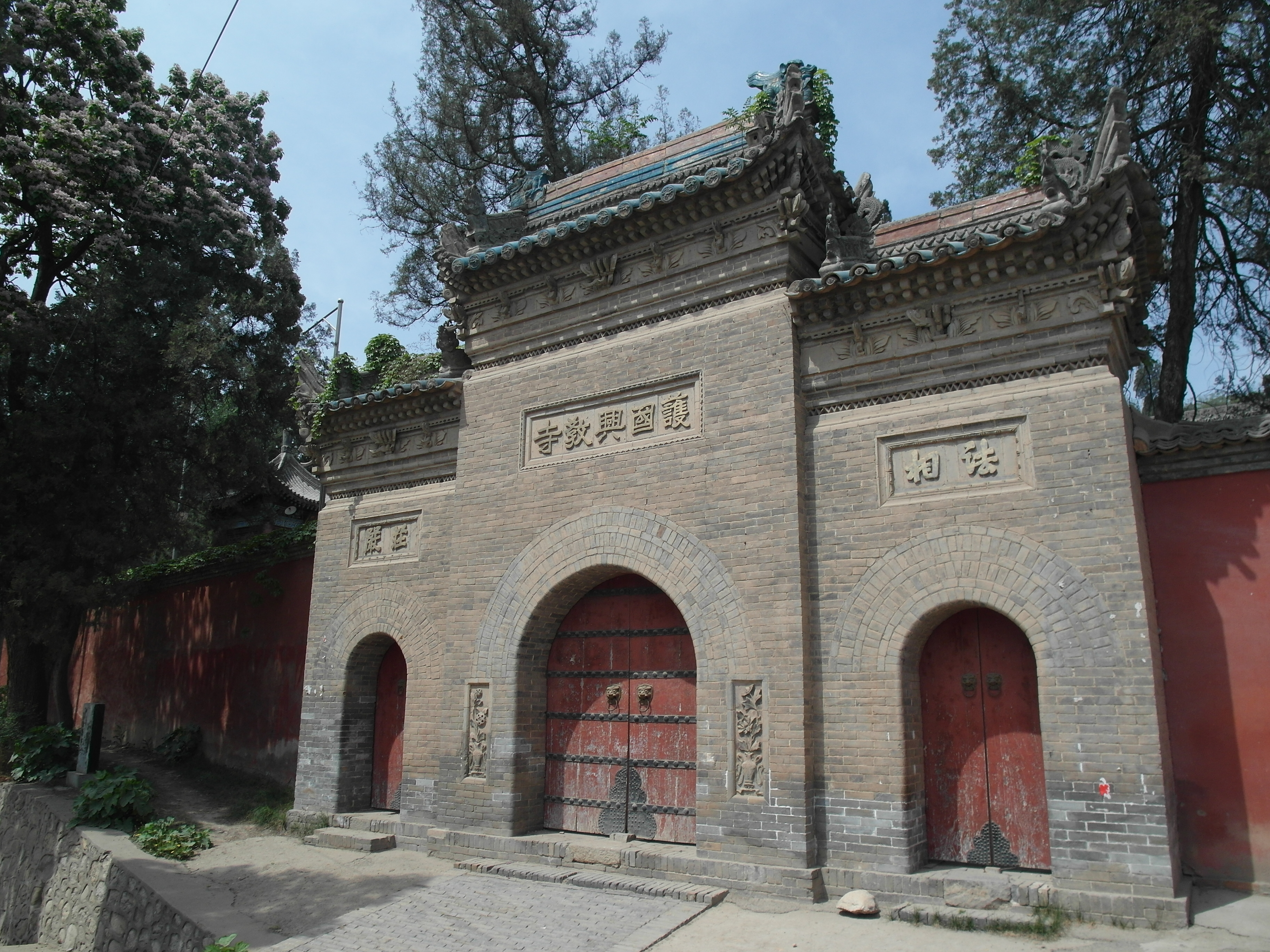 位于陕西省西安市长安区东南，被列入丝绸之路申遗名单